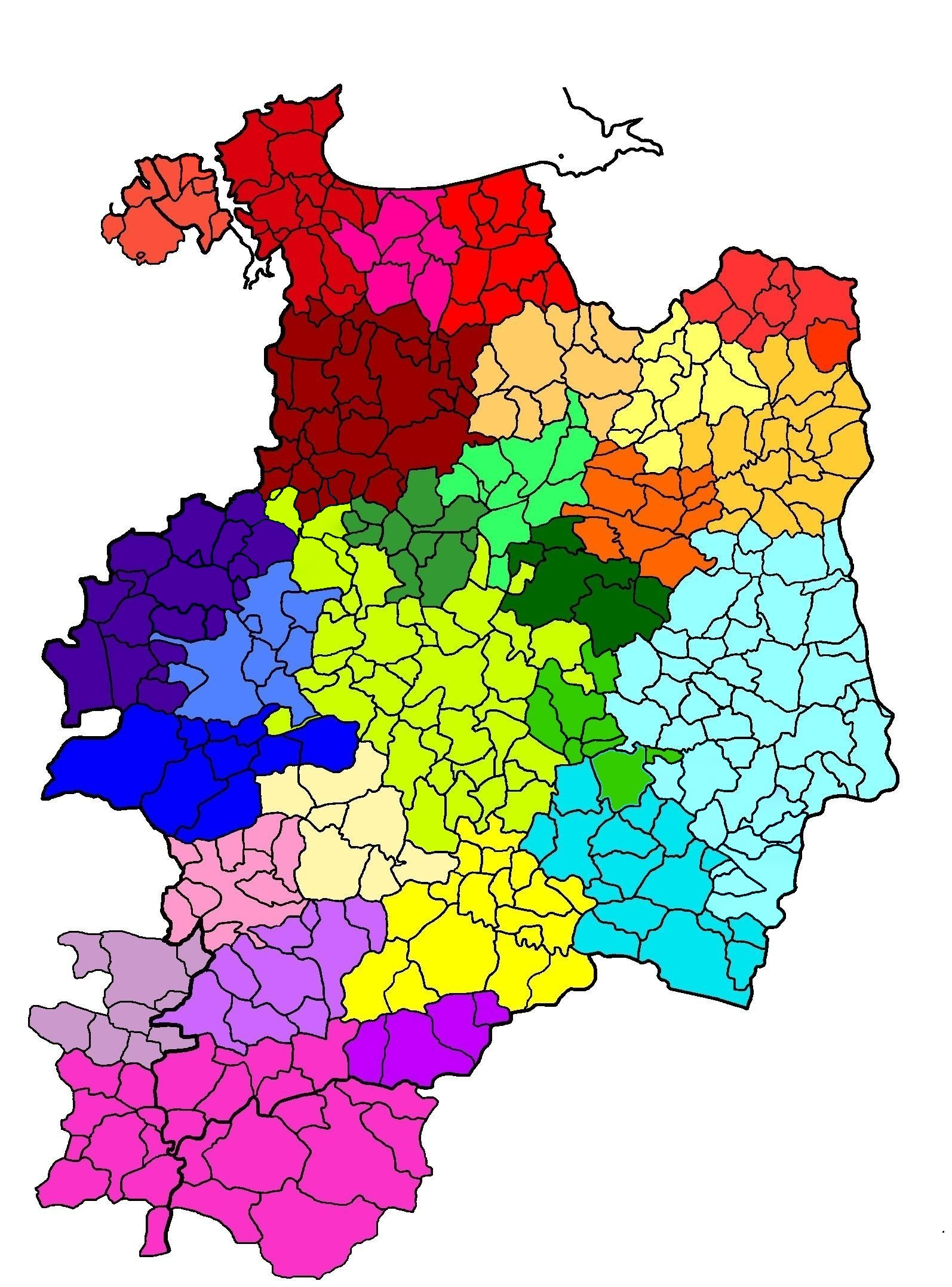 Intercommunalités-d'Ille-et-vilaine